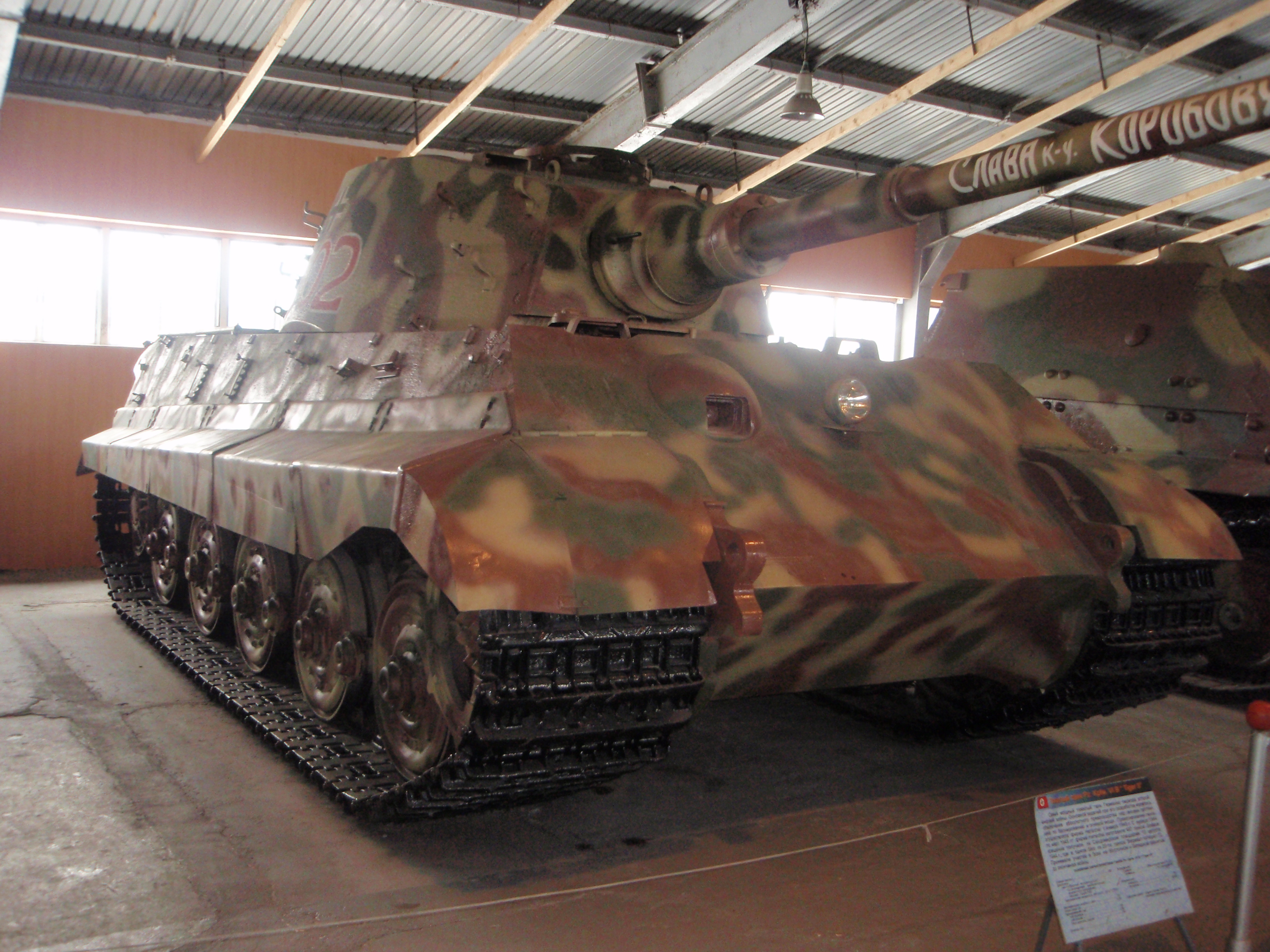 Немецкий тяжёлый танк Pz.VIB (Tiger II) в Кубинке